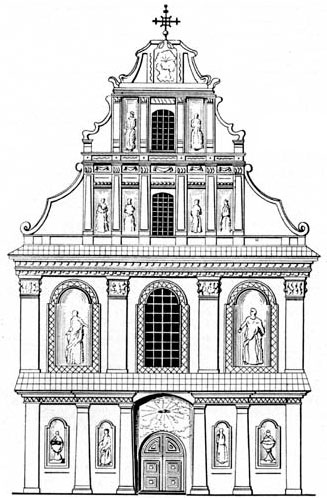 Беларуская (тарашкевіца): Менск (Miensk), рог Высокага Рынку (Vysoki Rynak) і вуліцы Дамініканскай (vulica Daminikanskaja). Царква Сьвятога Духа, абмеры